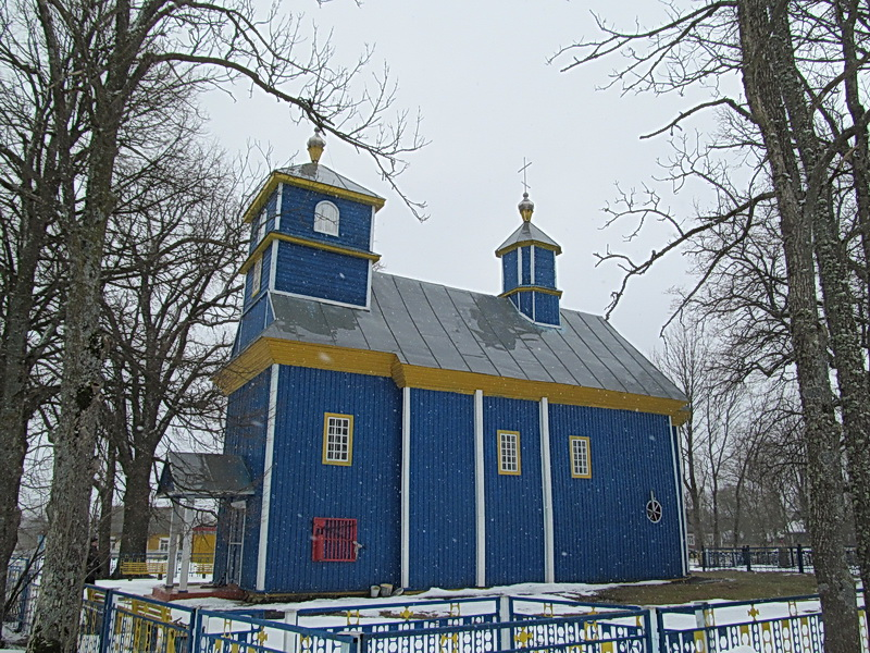 Пишите здесь